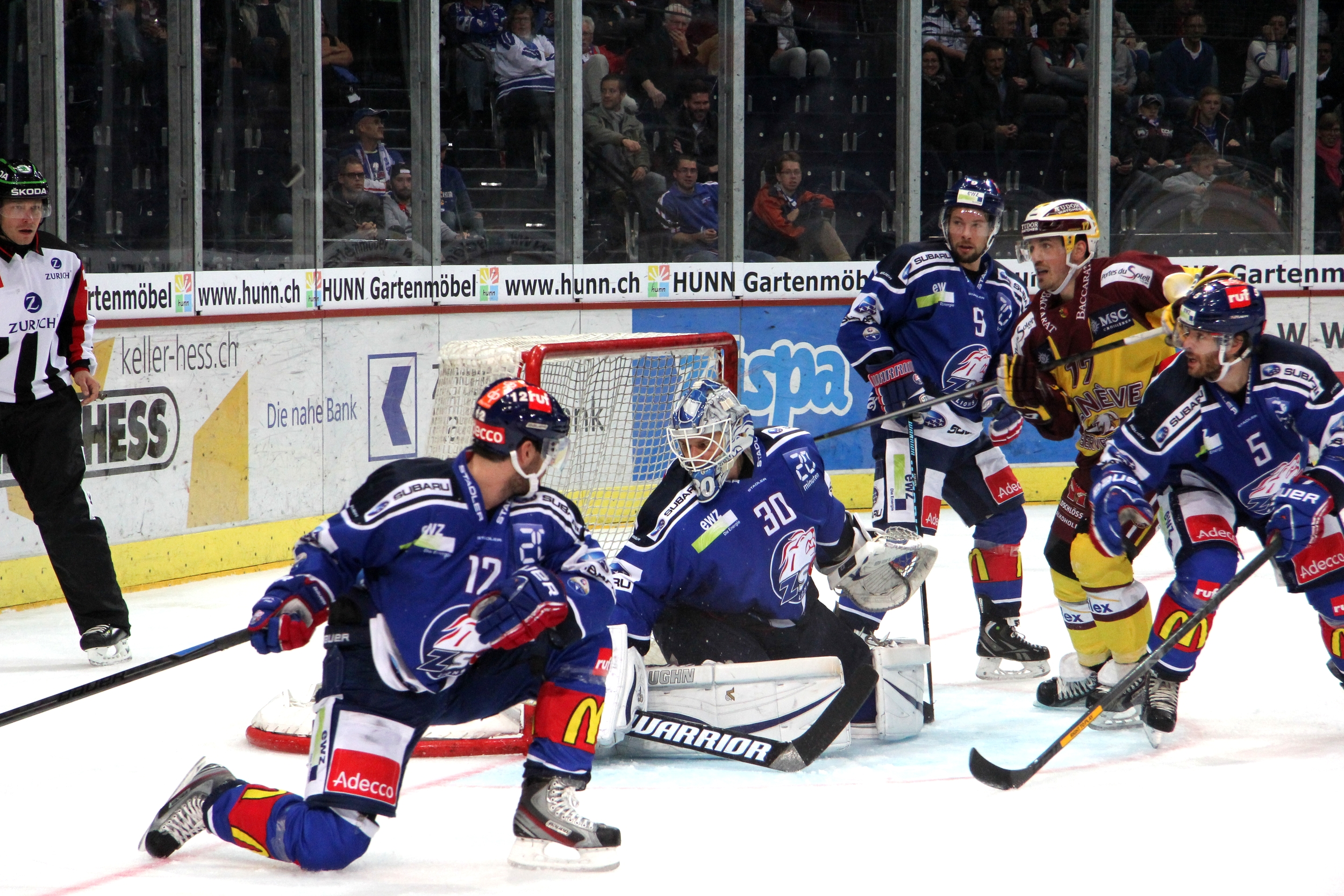 Gordon Schukies (R 53), Luca Cunti (Z 12), Lukas Flüeler (Z 30), Robert Nilsson (Z 9), Arnaud Jacquemet (Z 17), Severin Blindenbacher (Z 5).